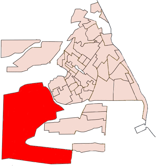 Barrio Zona de Chacras